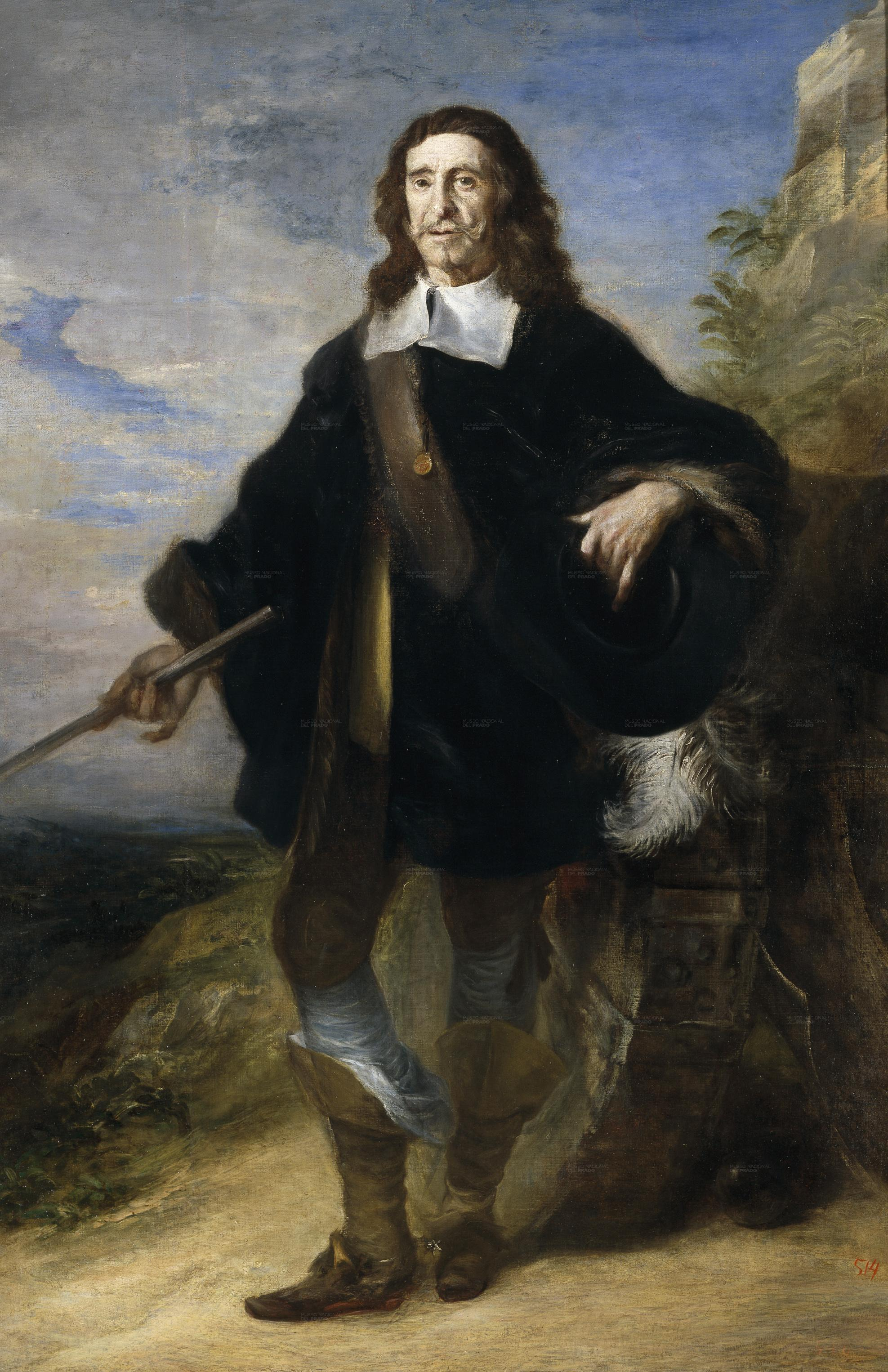 Retrato de un desconocido general del siglo XVII relacionado con el arma de artillería. Además el personaje retratado, como puede apreciarse en el lienzo, fue caballero de la Orden de Calatrava.